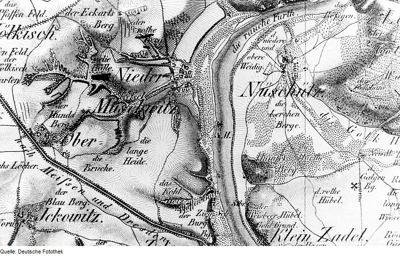 Original image description from the Deutsche Fotothek Diera-Zehren-Niedermuschütz. Oberreit, Sect. Oschatz, 1839/40